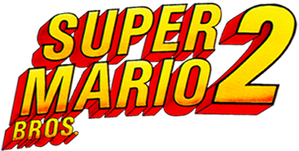 Logo du jeu vidéo Super Mario Bros. 2 (ou Super Mario USA au Japon).